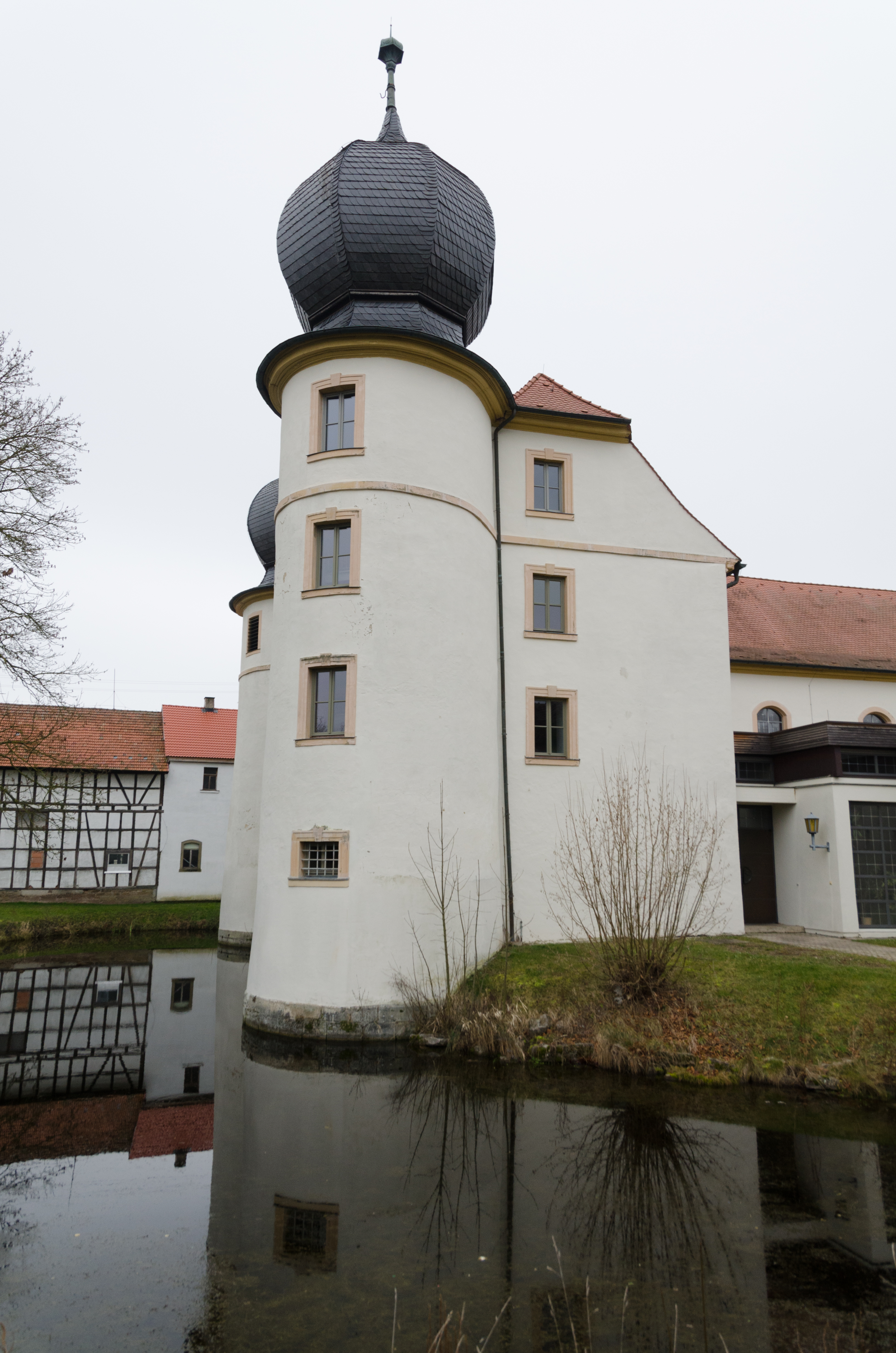 Wasserschloß Thundorf in Unterfranken